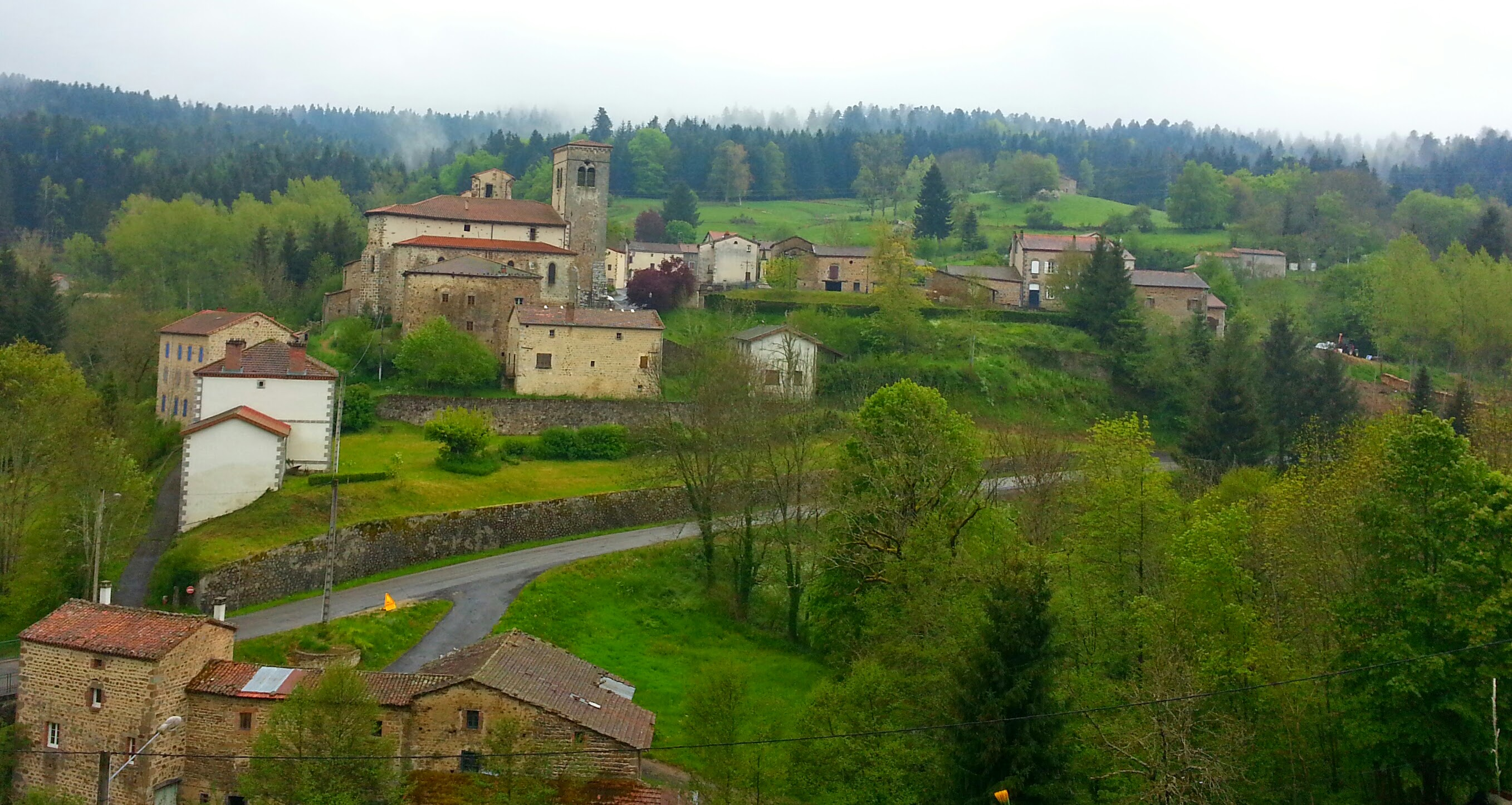 Le village d'Auzelles, au coeur du Livradois